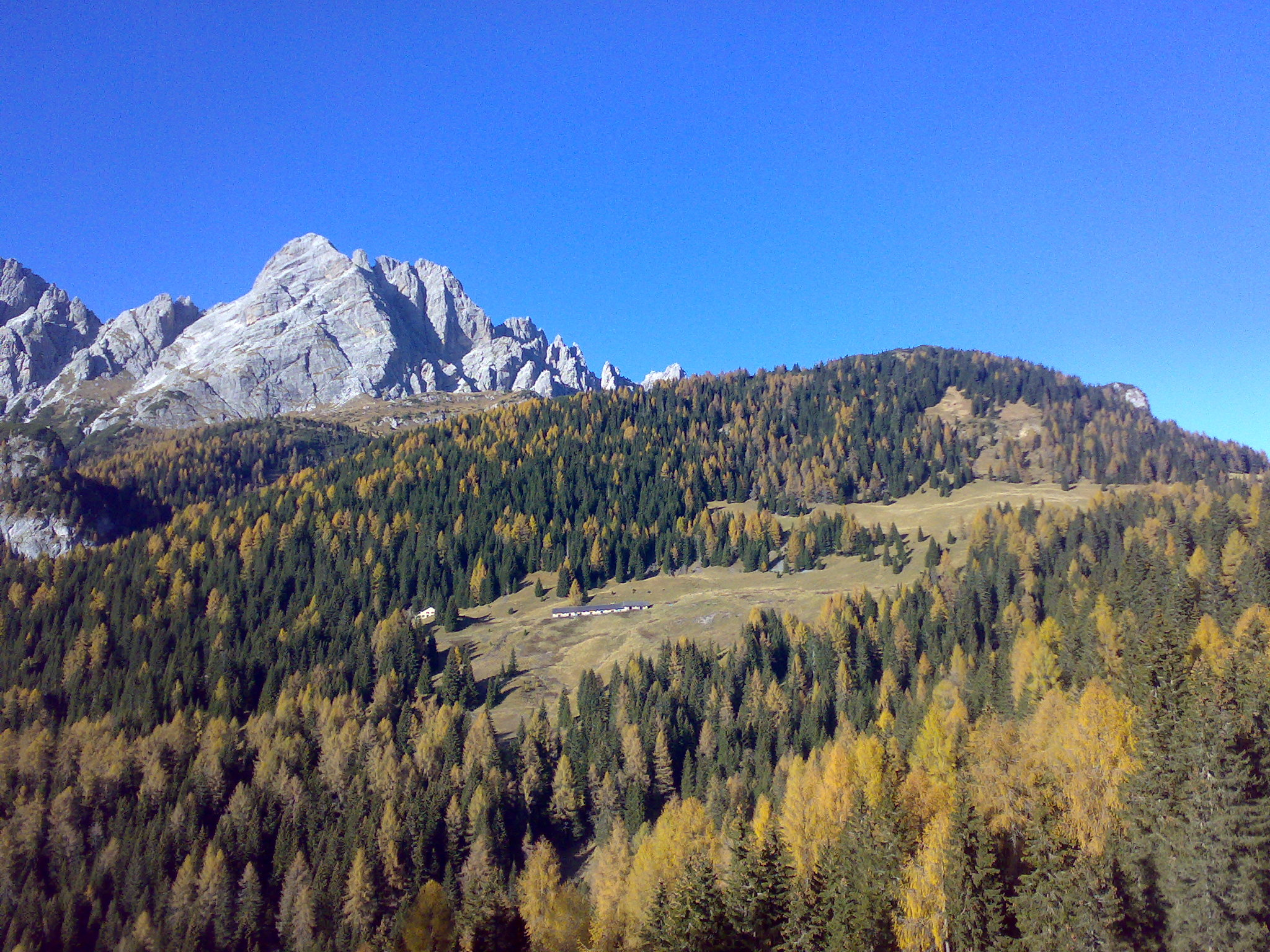 Bretoni e casera Losco.